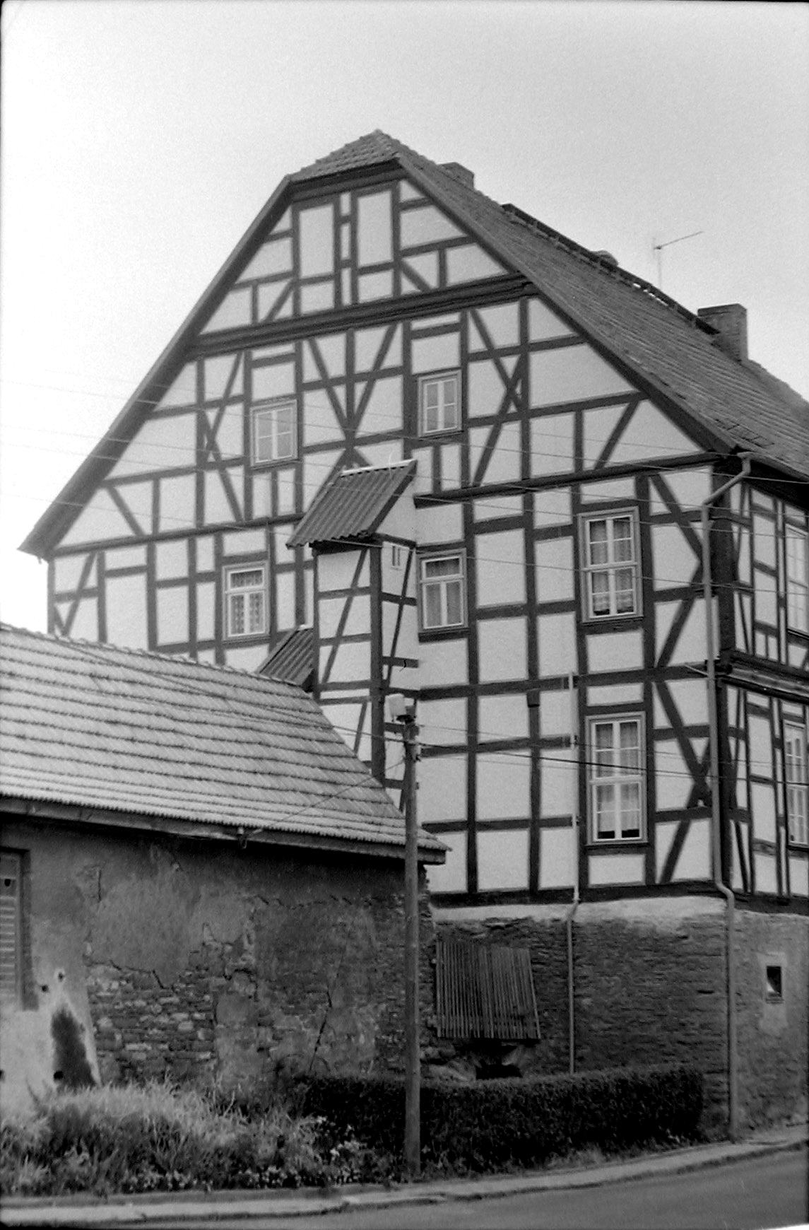 1989 in Rehungen